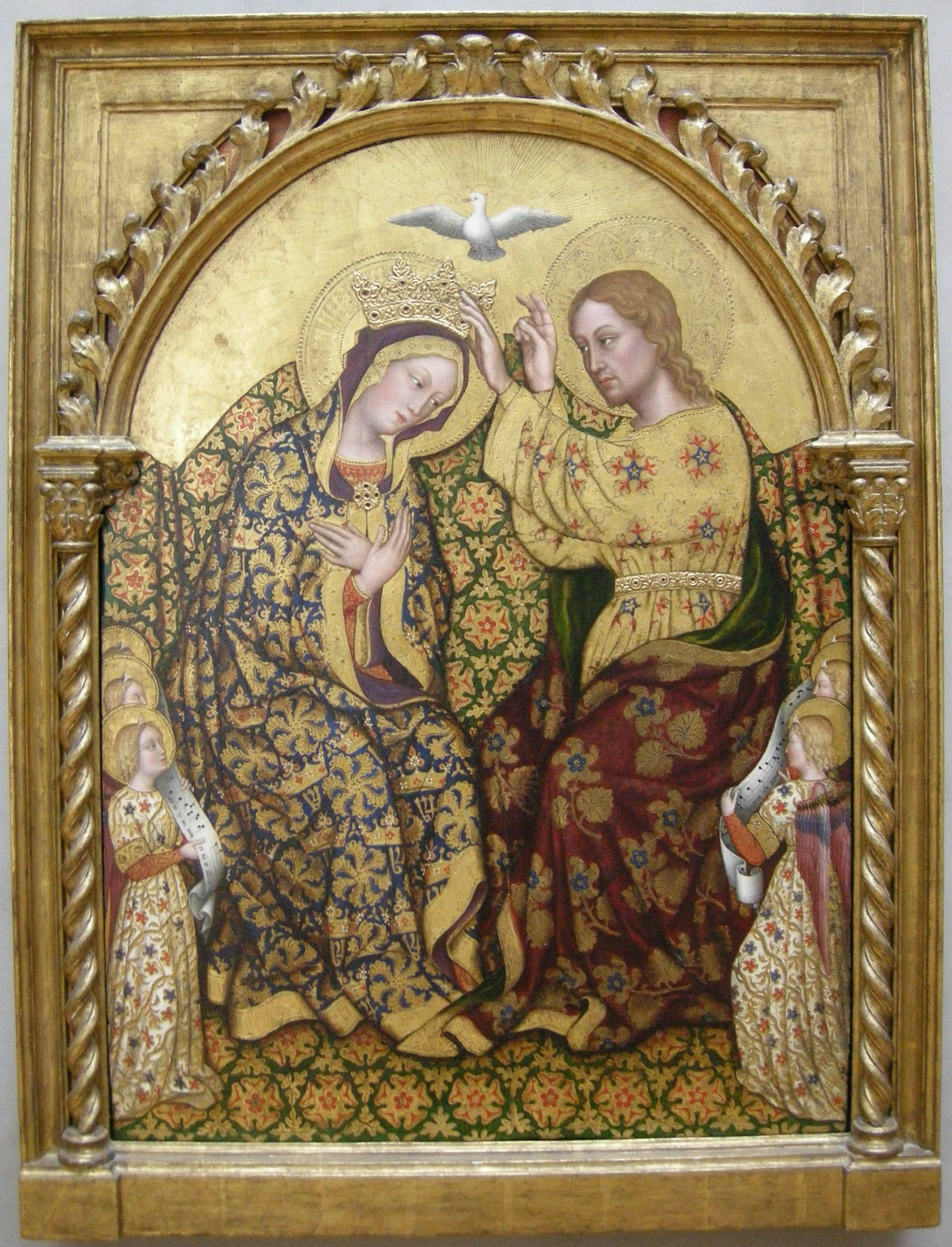 Gentile da fabriano, incoronazione della vergine, 1420 ca